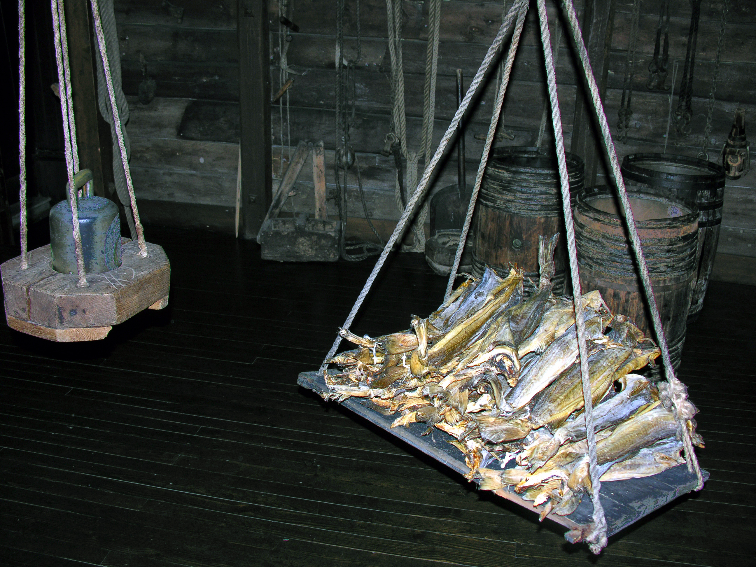 Pesatura dello stocafisso.